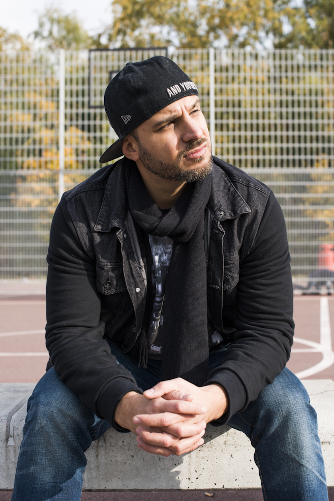 Ben Salomo beim Fotoshooting im Jahr 2015 in Berlin.